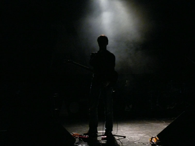 Boulbar - Live à Pontcharra - Mars 2007